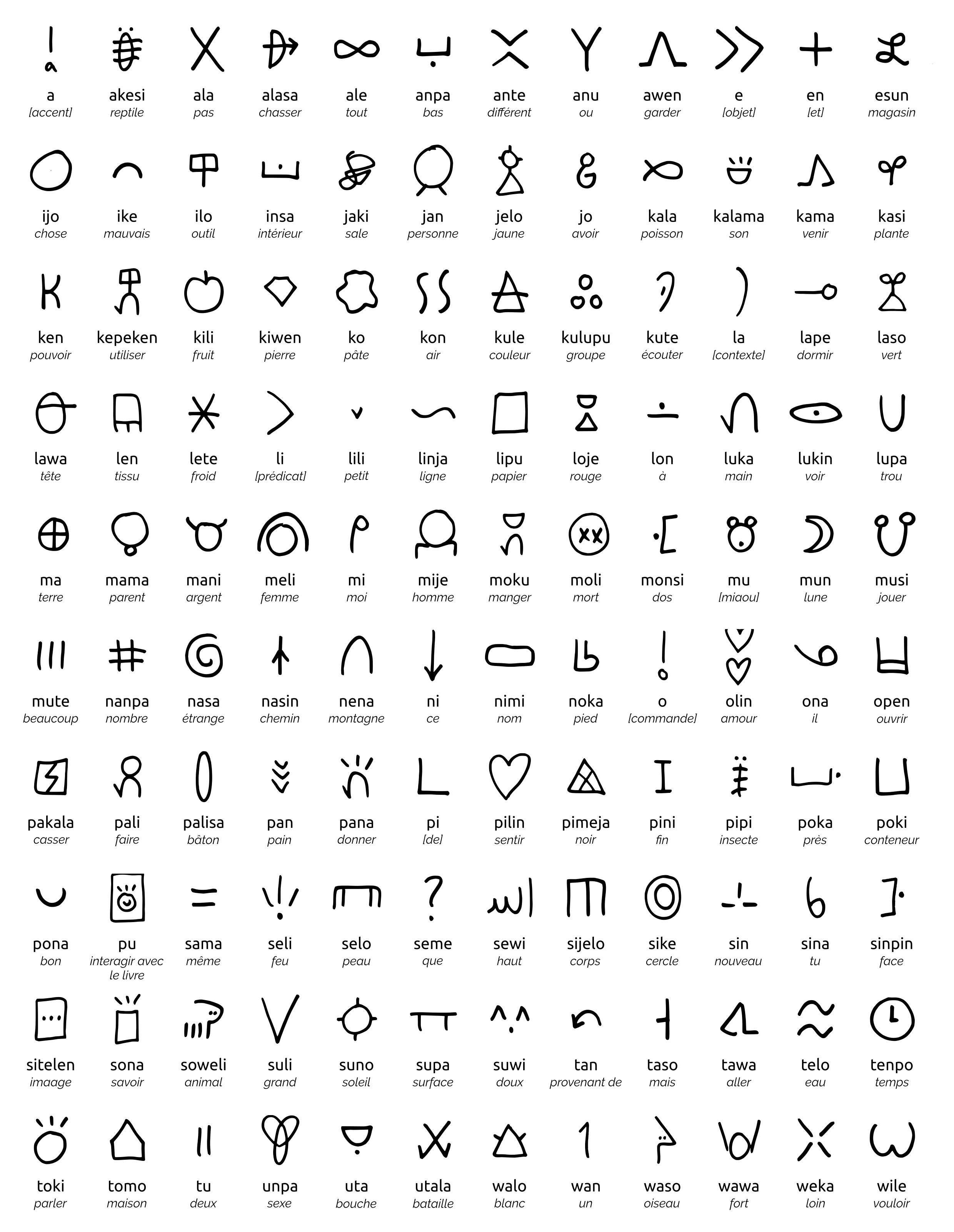 un système d'écriture pour toki pona fabriqué par Sonja Lang avec définitions en français